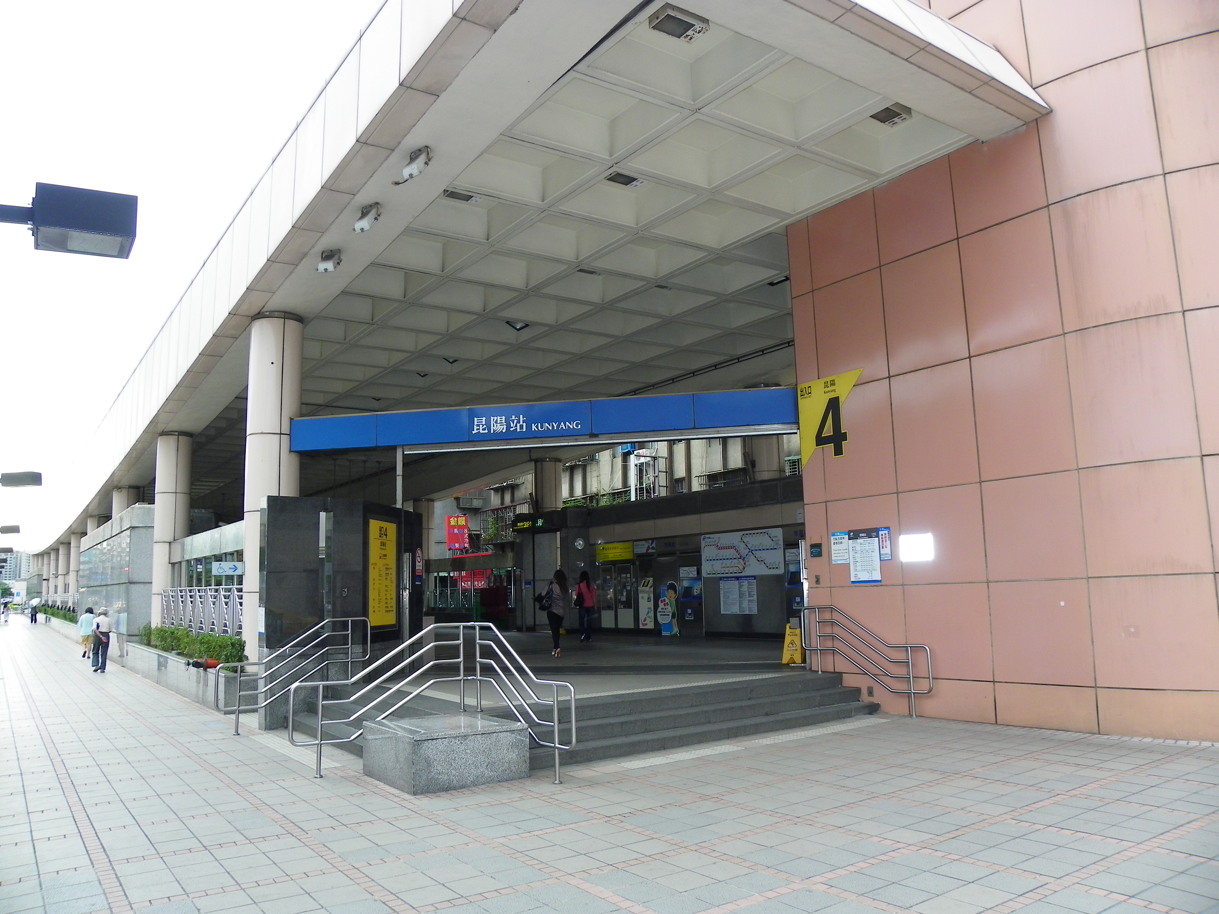 台北捷運南港線昆陽駅4号出口。